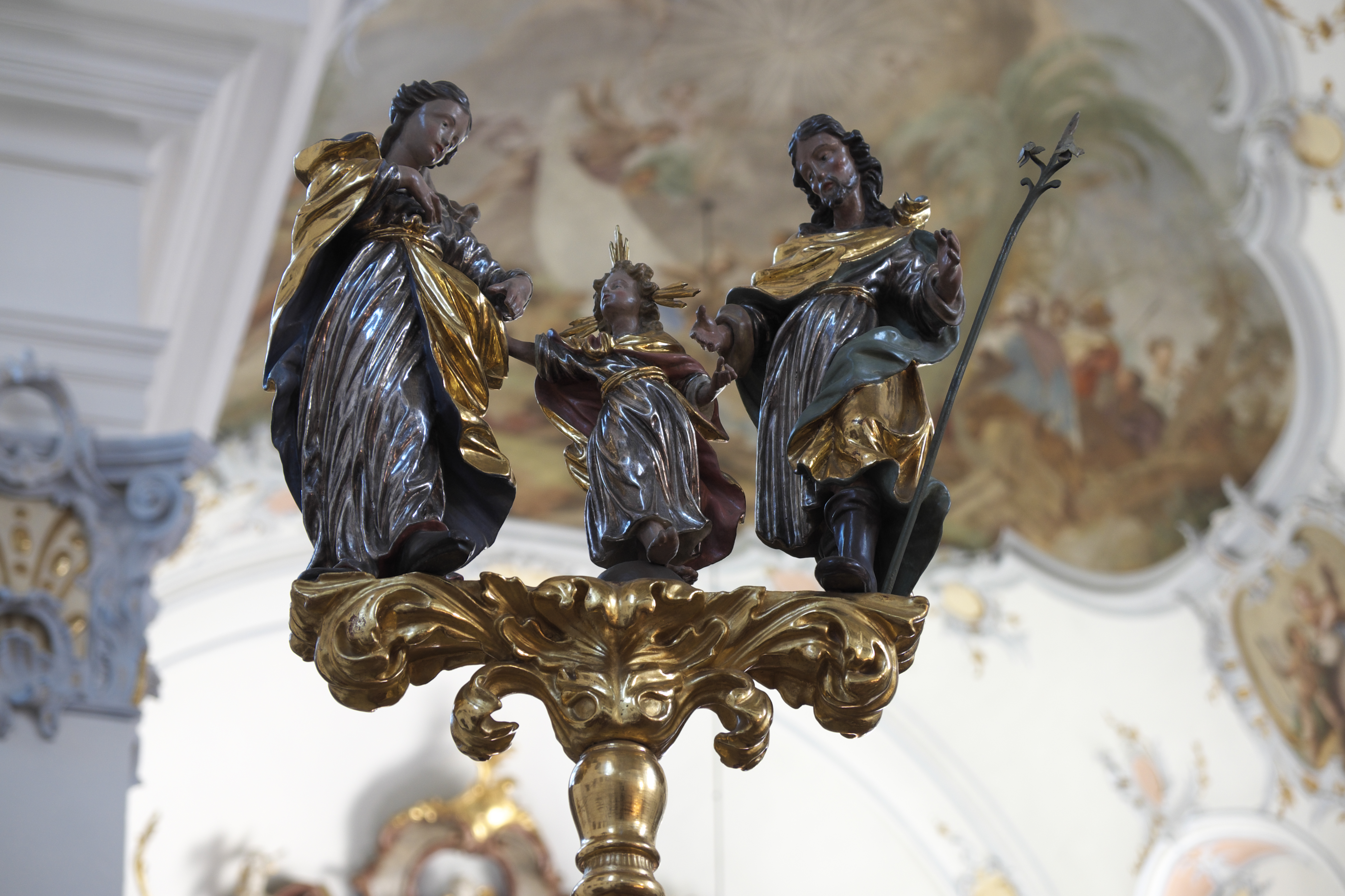 Katholische Pfarrkirche St. Johannes Baptist in Inning am Ammersee im Landkreis Starnberg (Bayern/Deutschland), Vortragestange mit Skulpturengruppe Heiliger Wandel